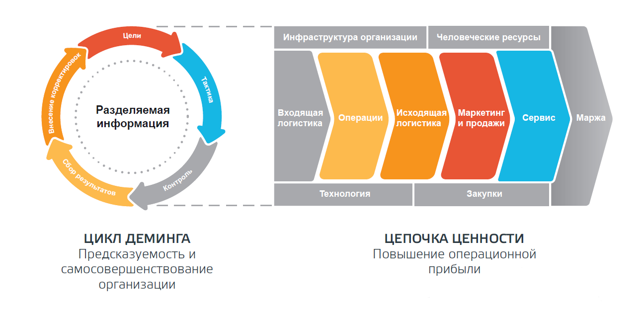 Реализация цикла Деминга и цепочки ценности на платформе ARTA SYNERGY